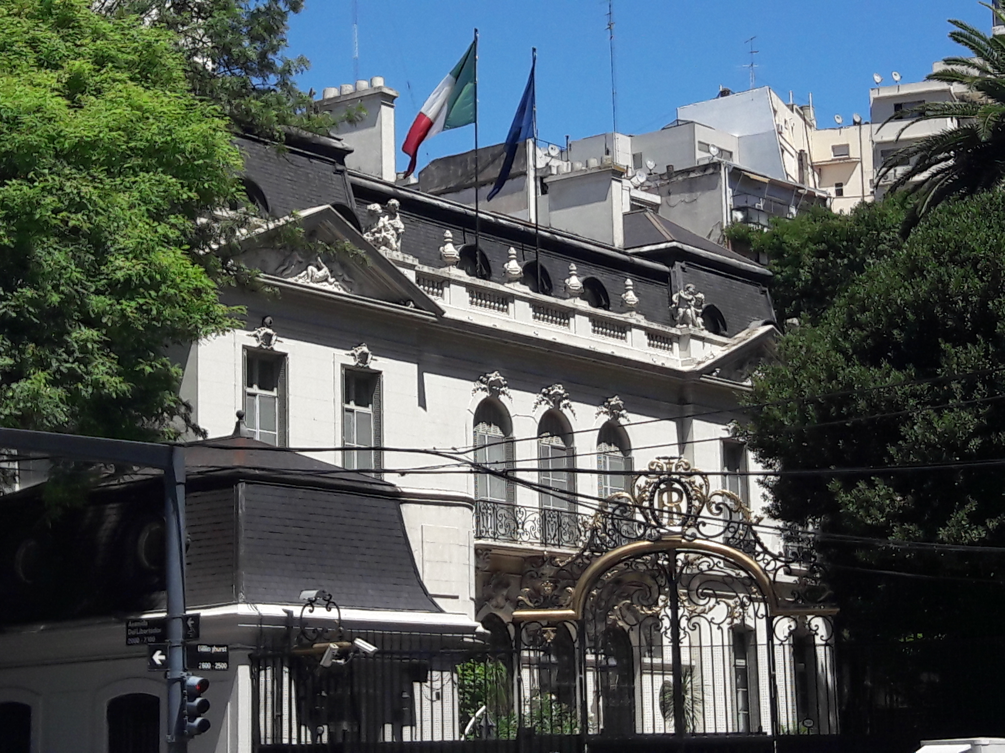 Embajada de Italia, Recoleta, Buenos Aires, Argentina.